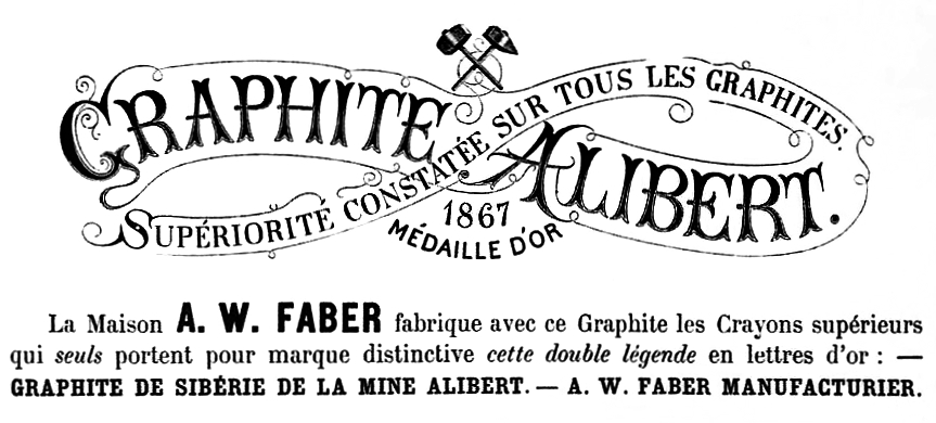 Золотая медаль за графит, Всемирная выставка в Париже, 1867 г.